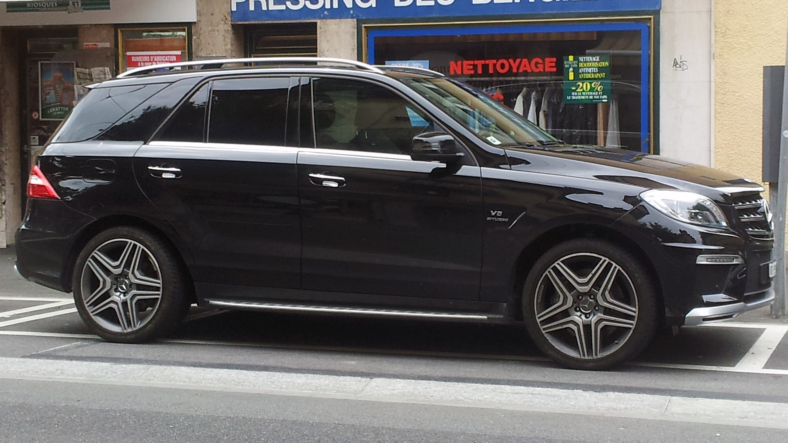 Mercedes-Benz ML 63 AMG (W166)